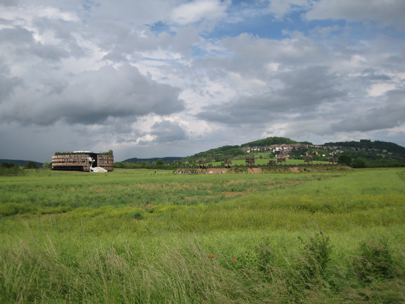 Muséoparc d'Alésia.